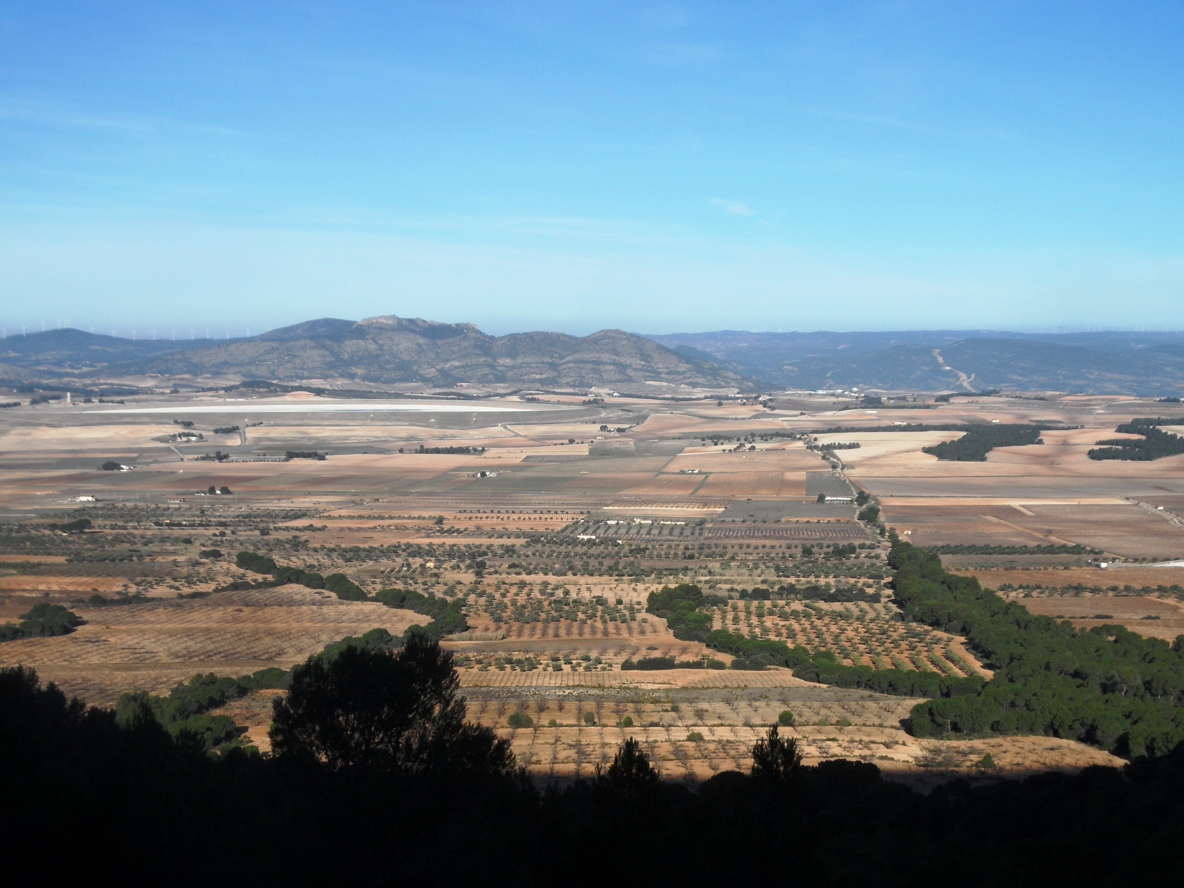 Vall dels Alforins; a la dreta la Vereda de la Safra, que marca el límit entre la província d'Alcant (Villena) i la de València (Fontanars dels Alforins) i, antigament, entre les Corones d'Aragó y Castella.